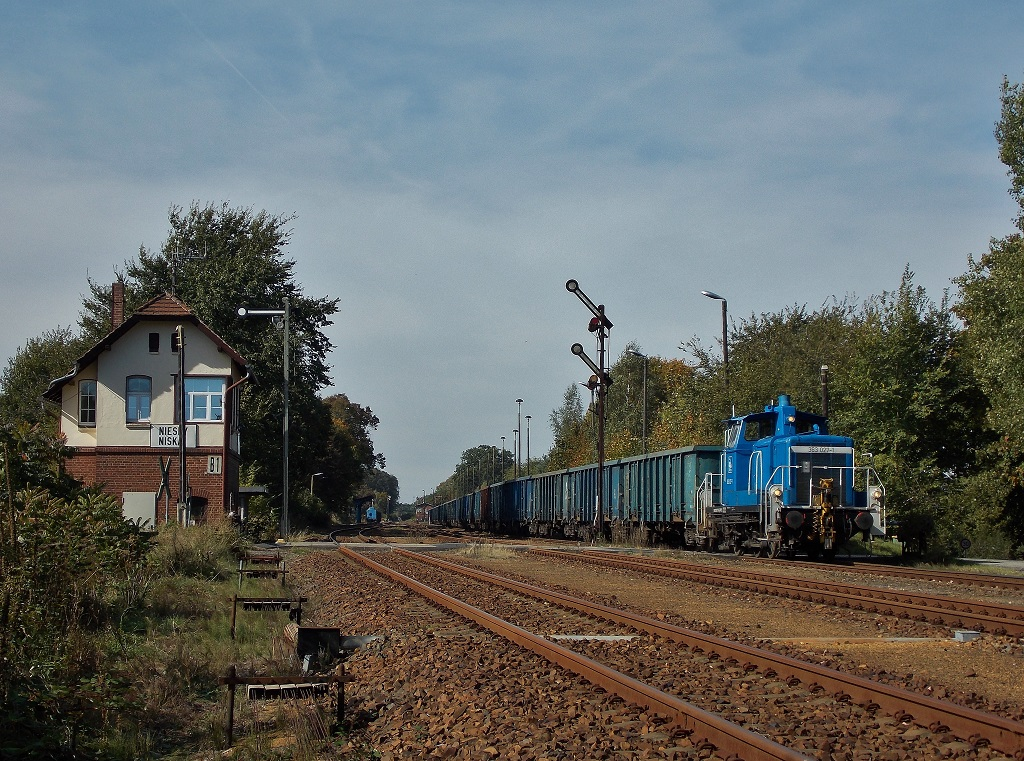 Die 363 027-1 mit einem Leerzug nach Horka Gbf in Niesky (04.10.2013)